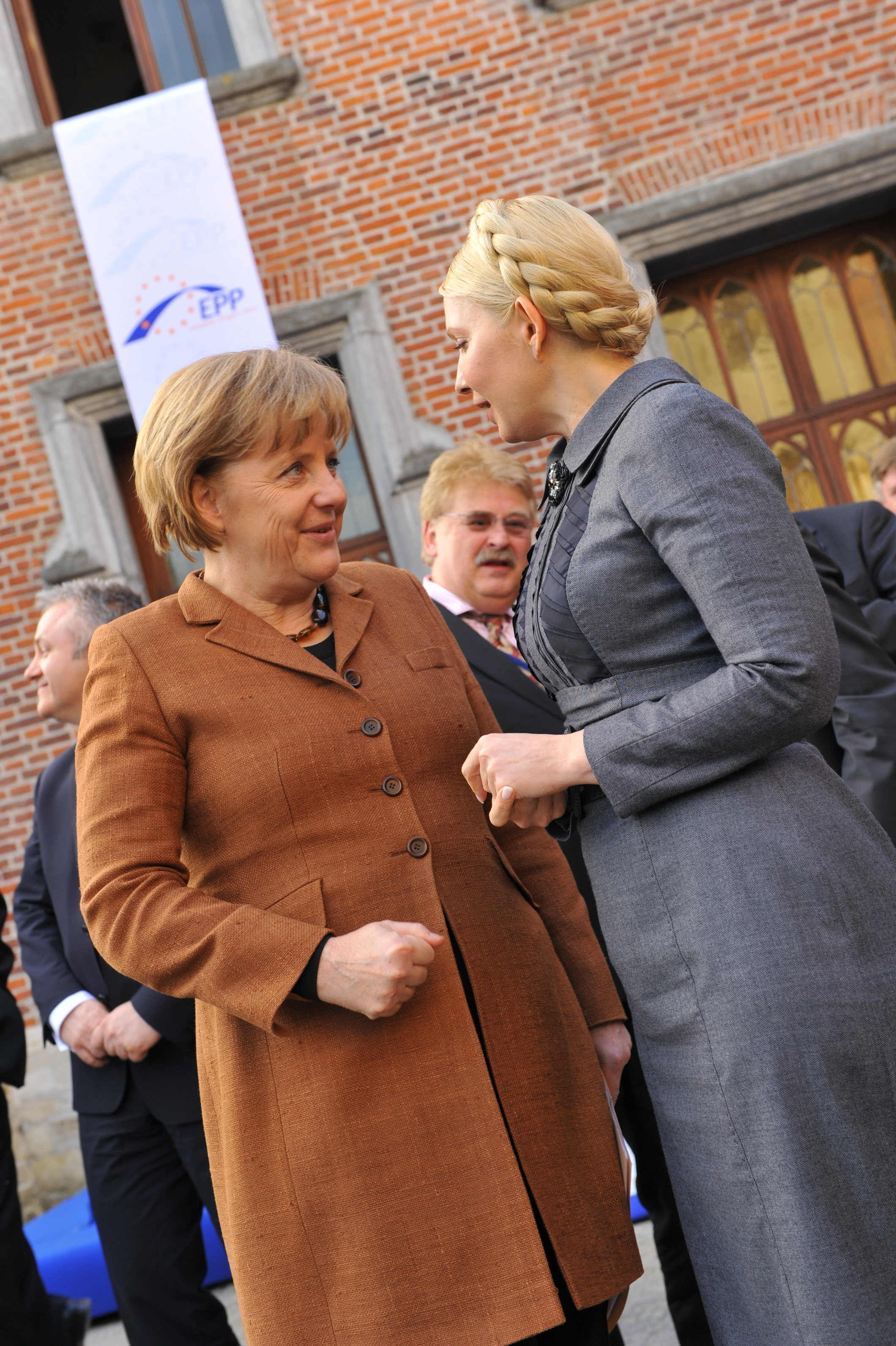 Merkel, Tymoshenko